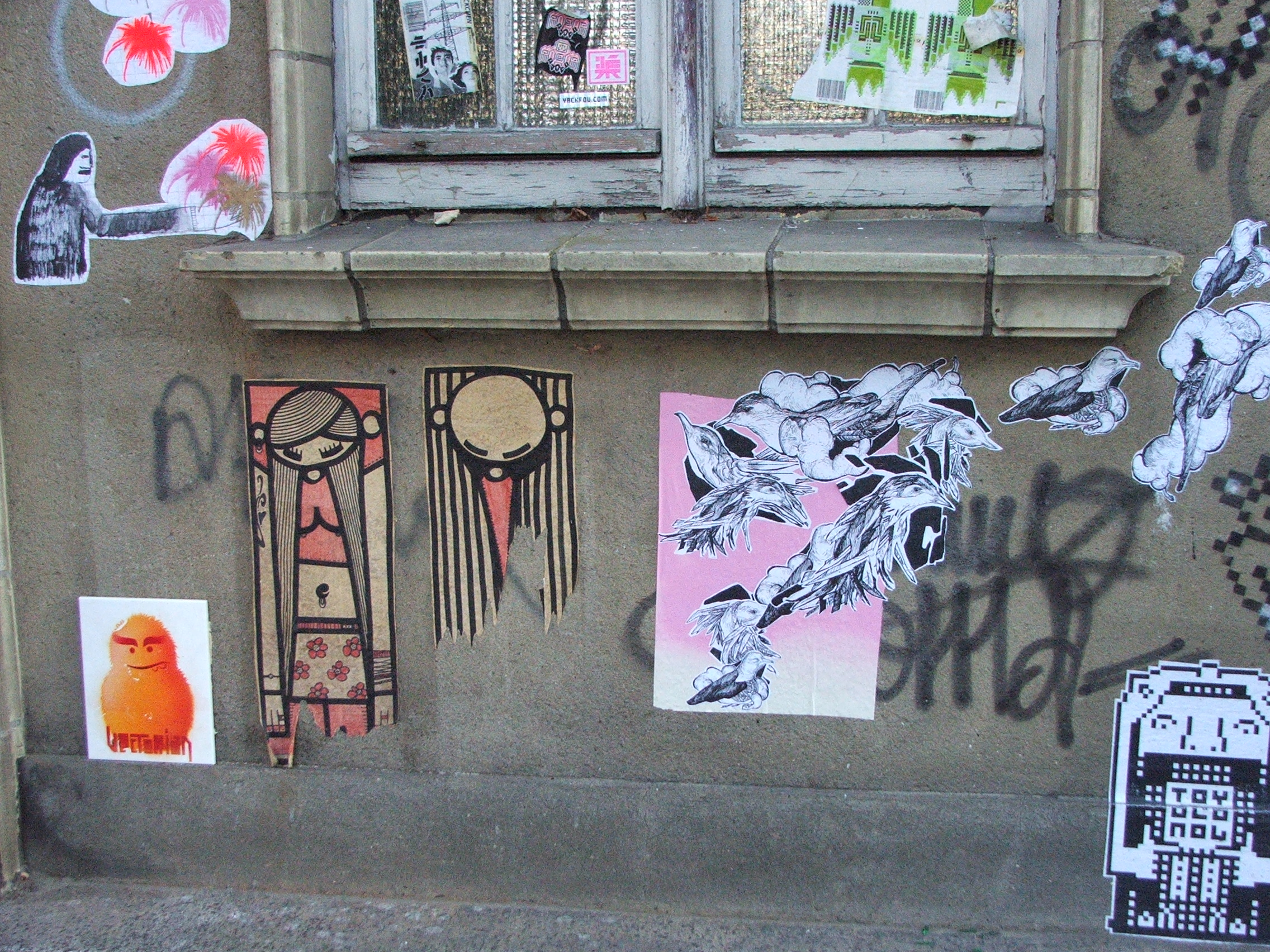 sticker art in berlin 2005